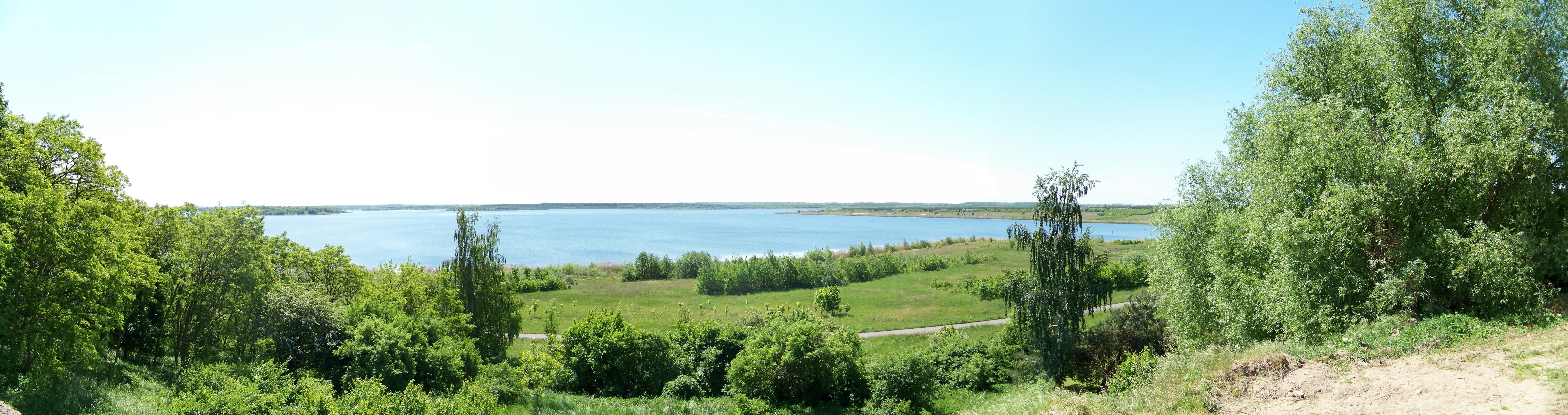 Goitzsche von Pouch aus gesehen